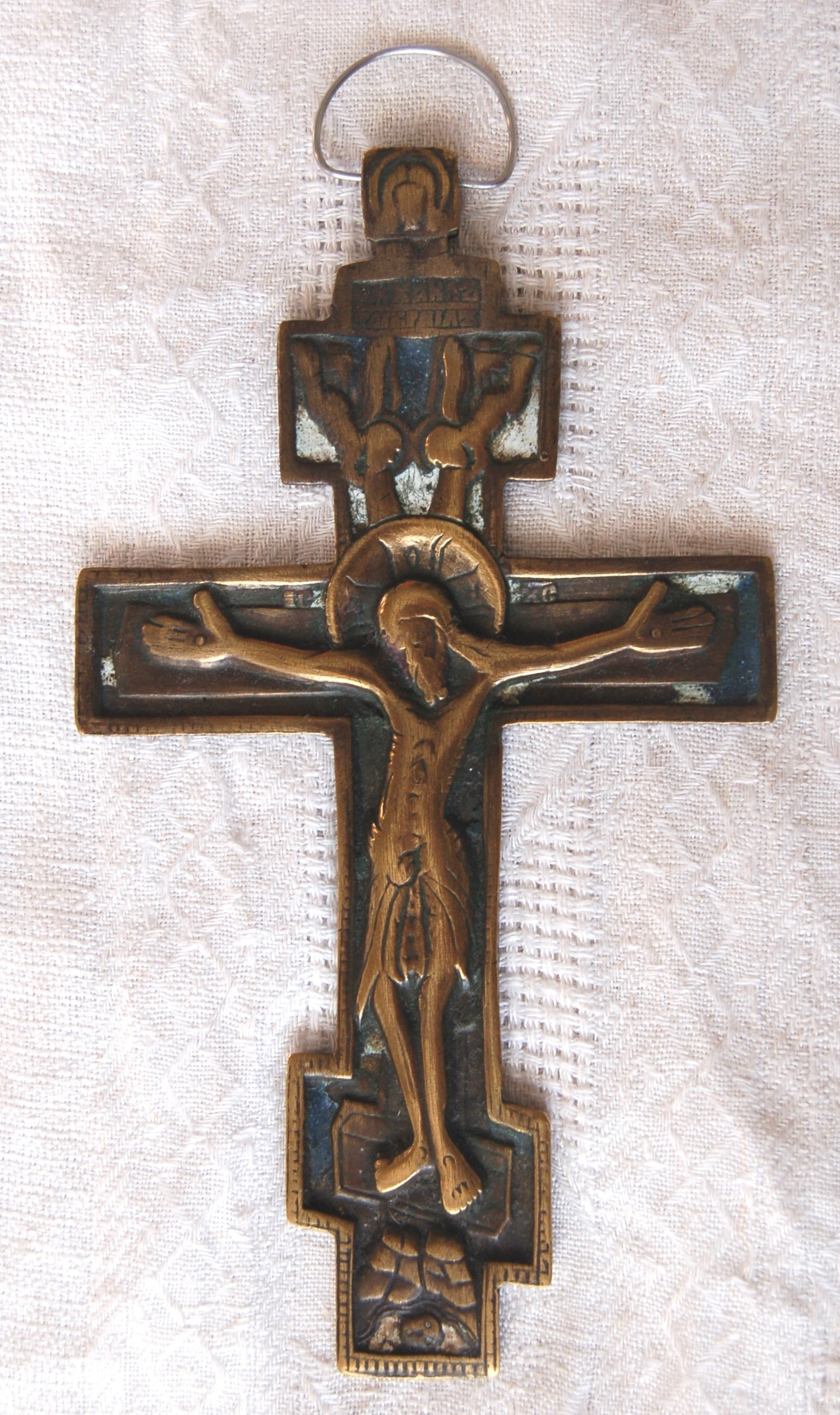 Православное распятие, Россия, г. Кинешма, XIX — начало XX века; остатки эмали